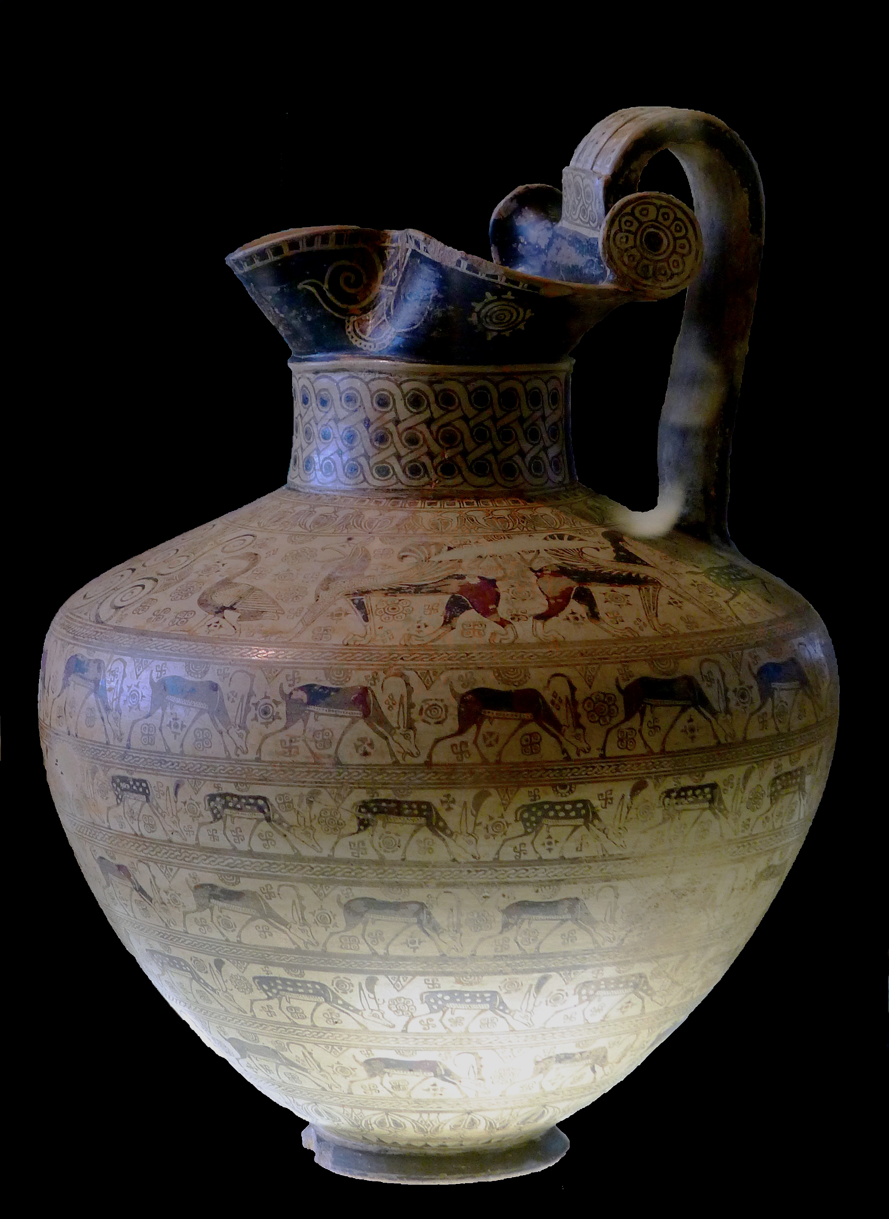 Sphinges, griffons, oies, chèvres, et daims.